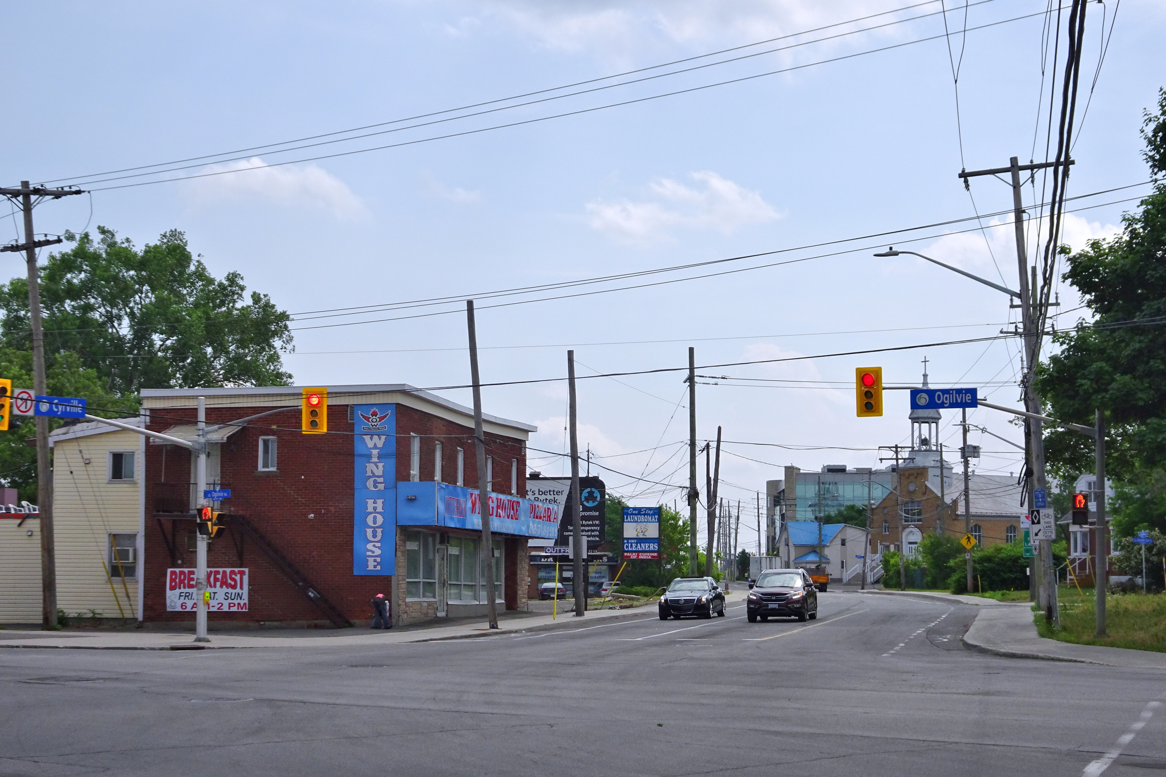 Cyrville, Ottawa, Ontario, Canada